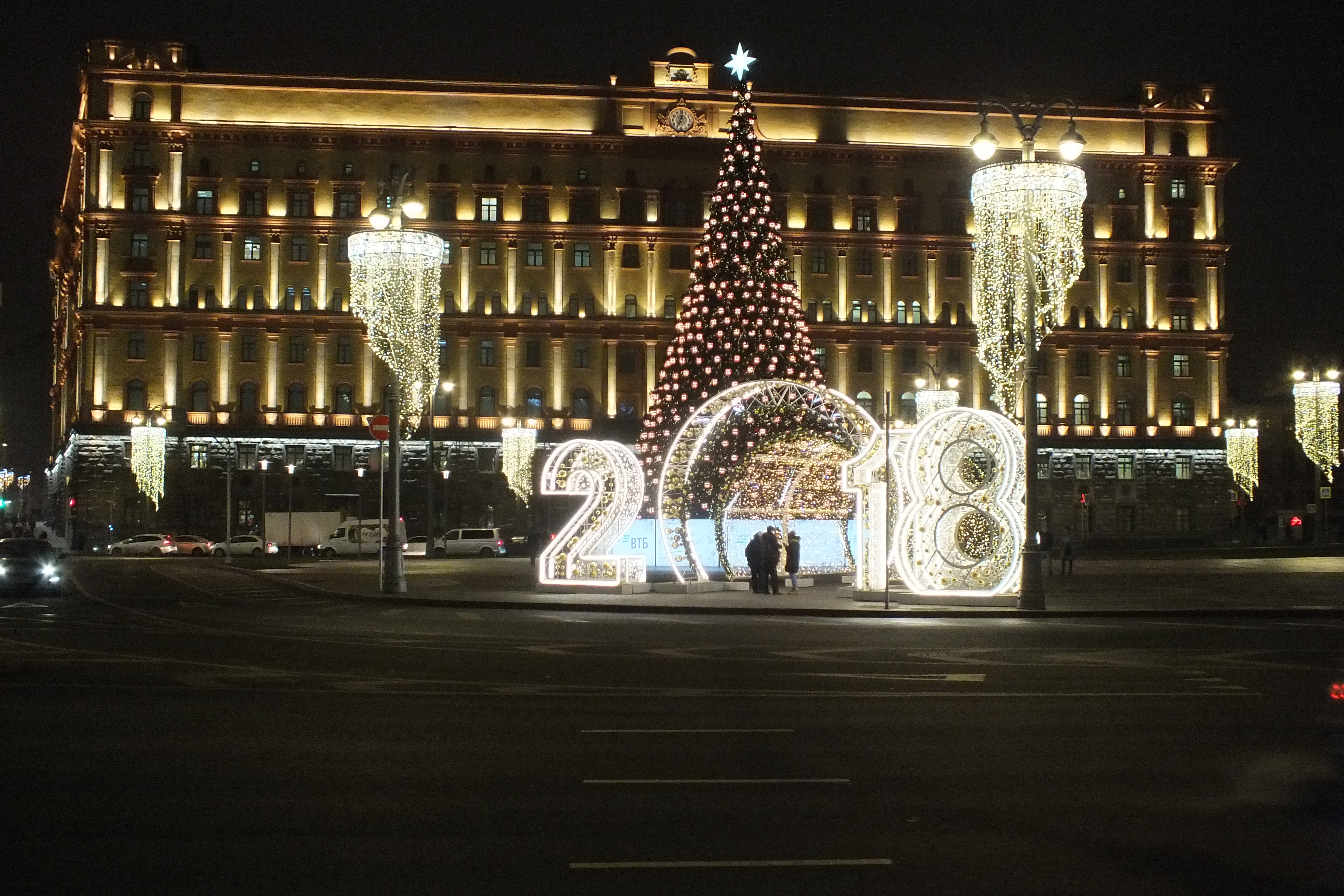 Эмблема 2018 года и новогодняя ёлка на фоне здания ОГПУ-НКВД-КГБ СССР (доходный дом Страхового общества Россия): Мясницкая улица, дом 1, Москва. Снято 29 декабря 2017 года в 7 часов вечера